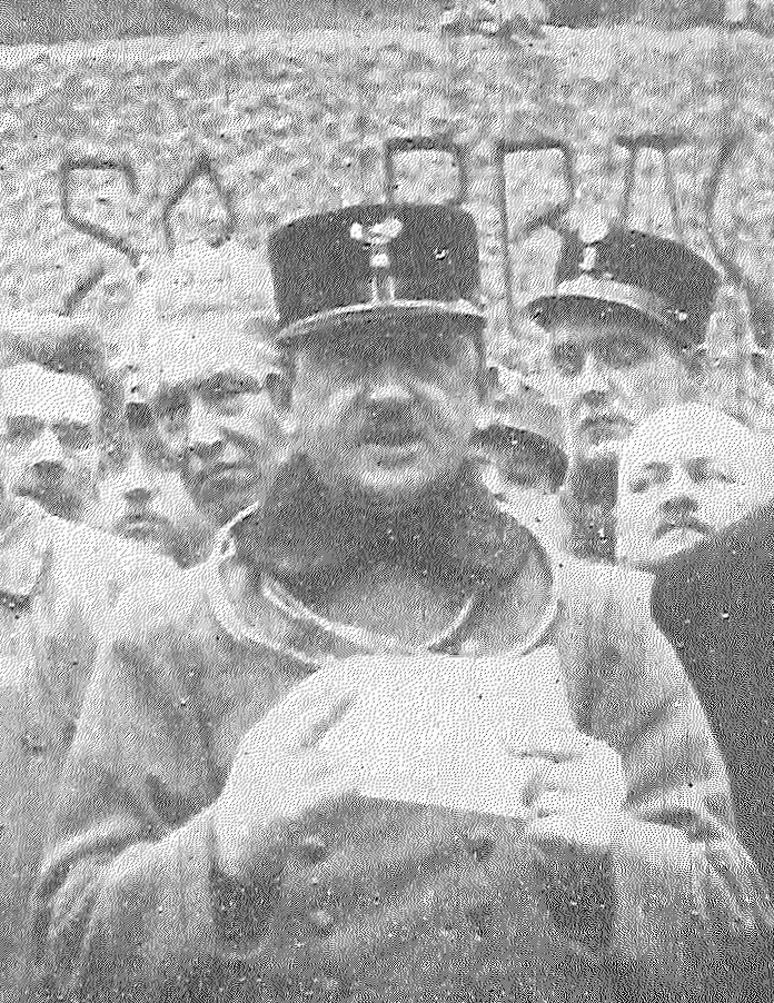 Setník Jaroslav Rošický v říjnu 1918.